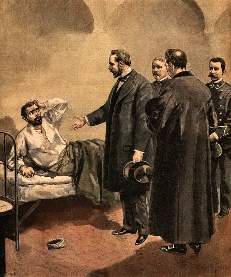 Le réveil de Joseph Vacher pour son exécution, le 31 décembre 1898